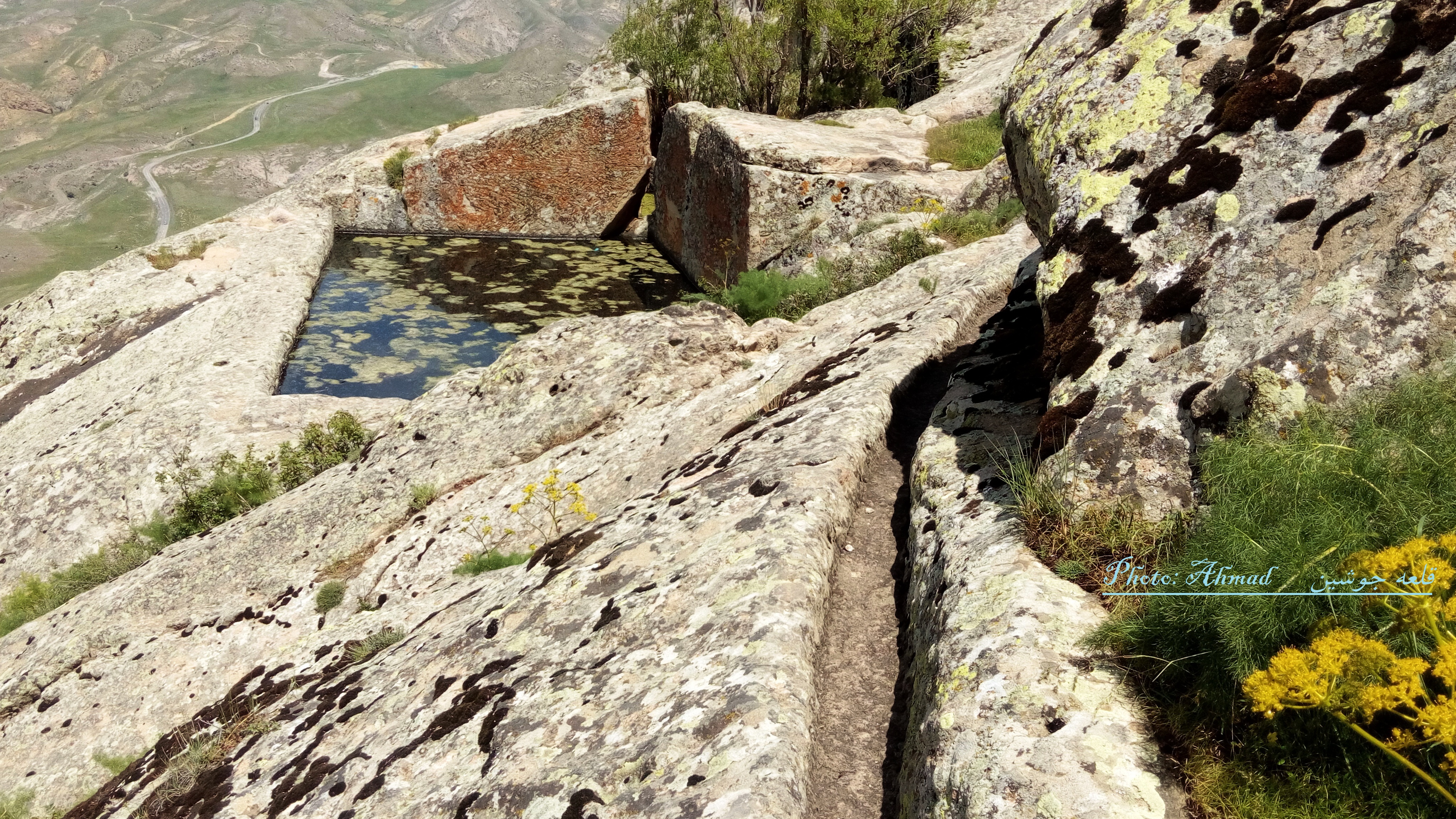 حوضچه هایی که جهت ذخیره آب باران و برف از دل سنگ کنده شده است .حتی کانالی که از سنگ منده شده نیز قابل مشاهده است .این کانال نیز آبهای سطحی قلعه را جمه و به حوضچه ها هدایت میکند. حوضچه ای که داخل آن درخت بید روییده است(سوودی گول)